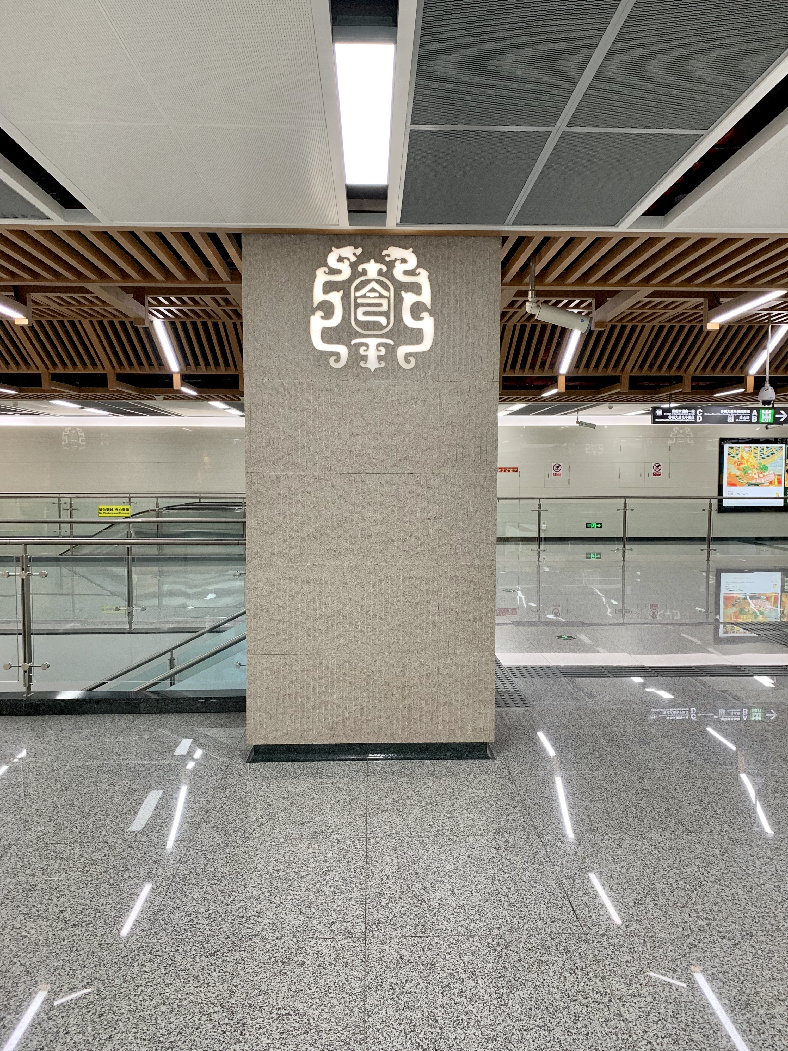 成都地铁马超西路站